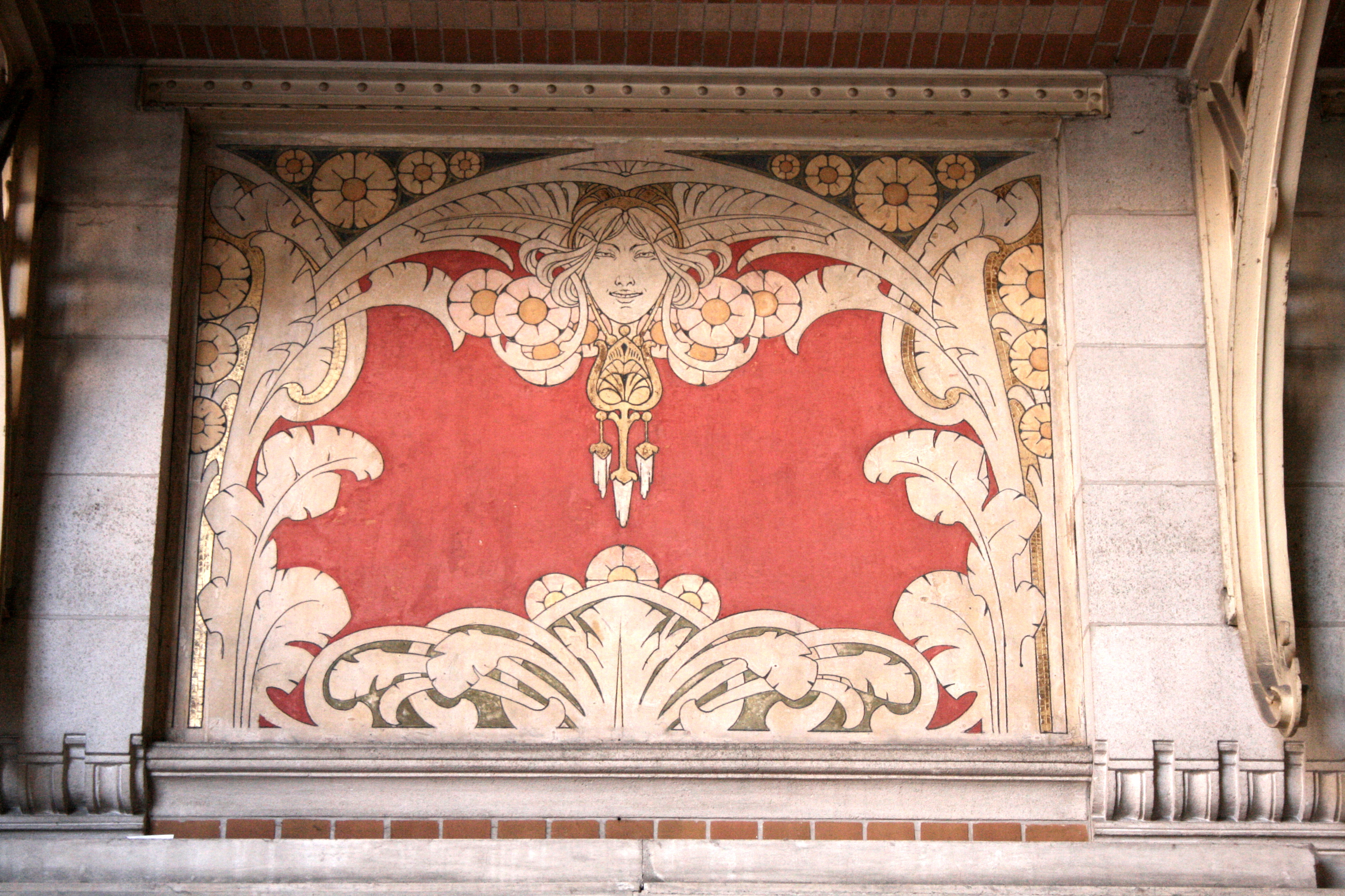 Rue Josaphat 229, Schaerbeek (Bruxelles). Groupe scolaire Josaphat. Architecte Henri Jacobs. Sgraffites de Henri privat-Livemont